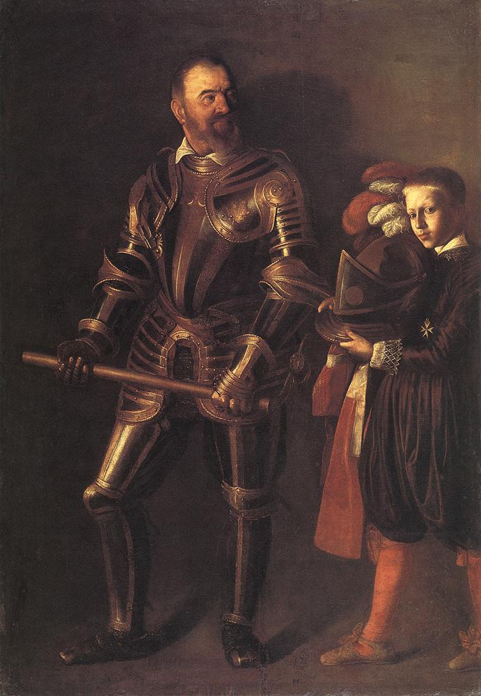 Portrait d'Alof de Wignacourt. Huile sur toile, 195 x 134 cm - Musée du Louvre